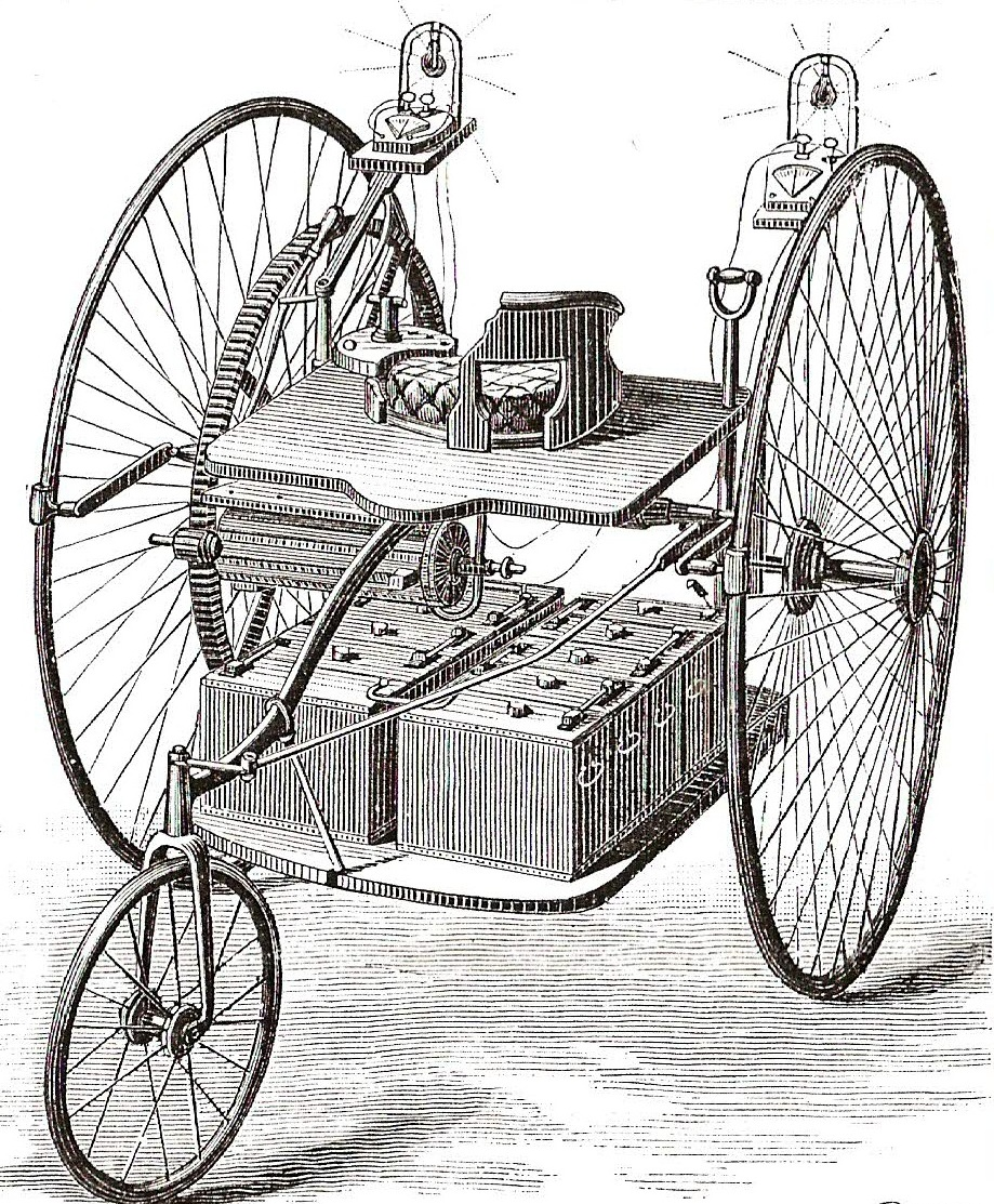 Elektrisches Dreirad